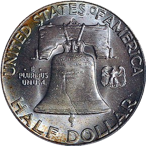 Benjamin Franklin Half Dollar Obverse